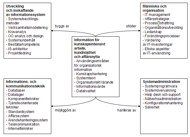 Ramverk för området informtionssystem